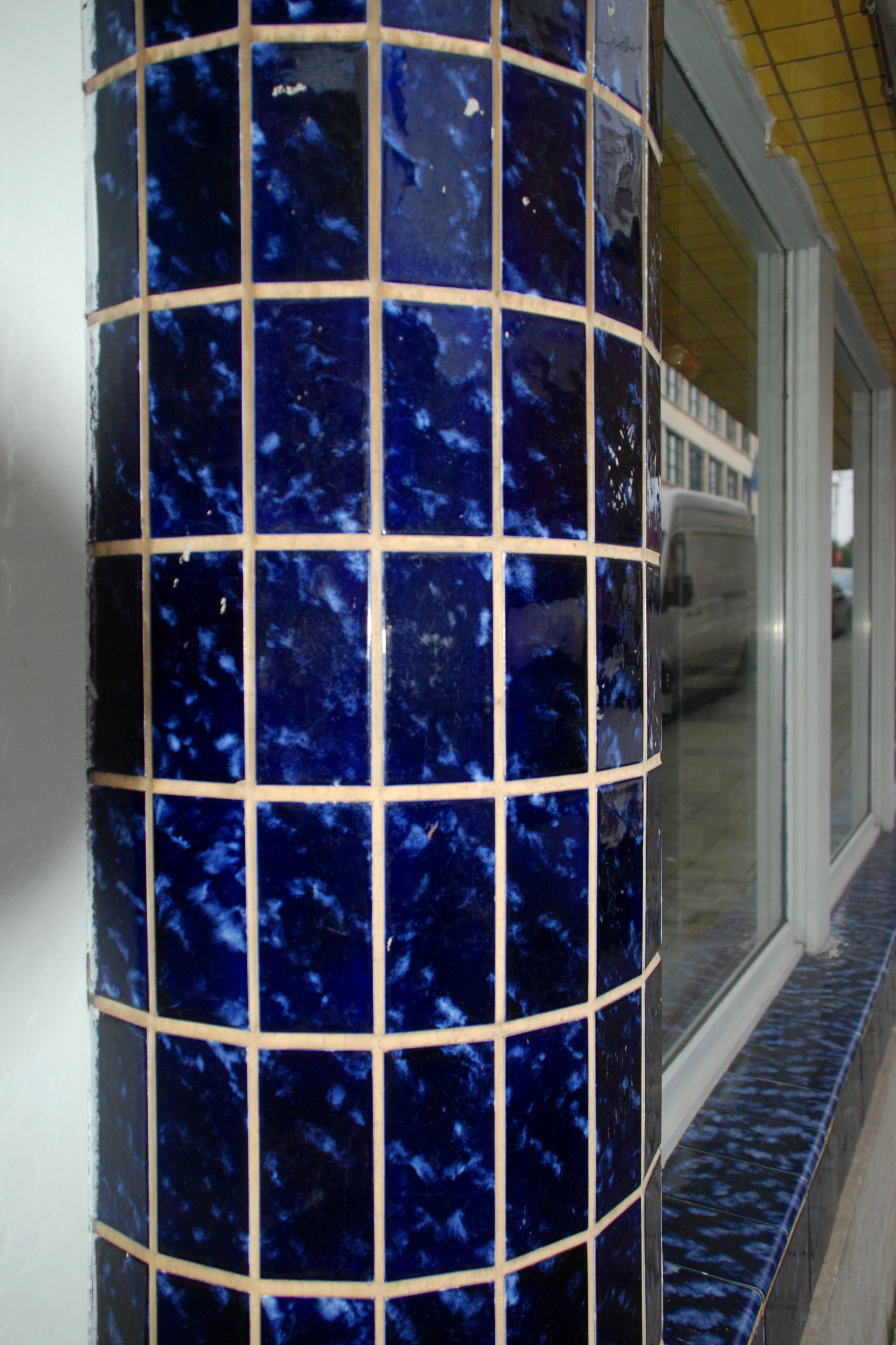 Belgique - Bruxelles - Berchem-Sainte-Agathe - Modernisme - Ateliers Helman